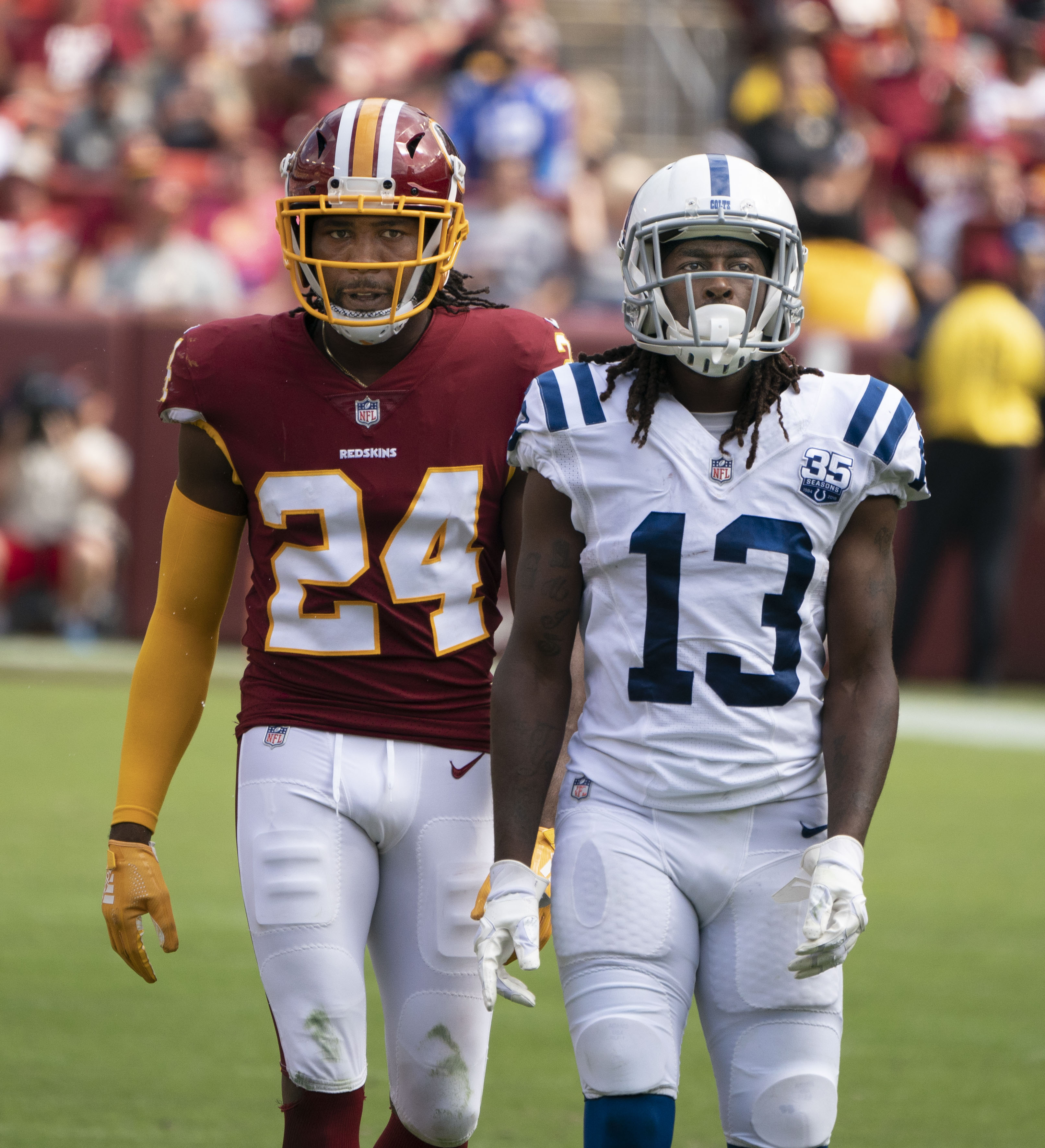 Colts at Redskins 09/16/18